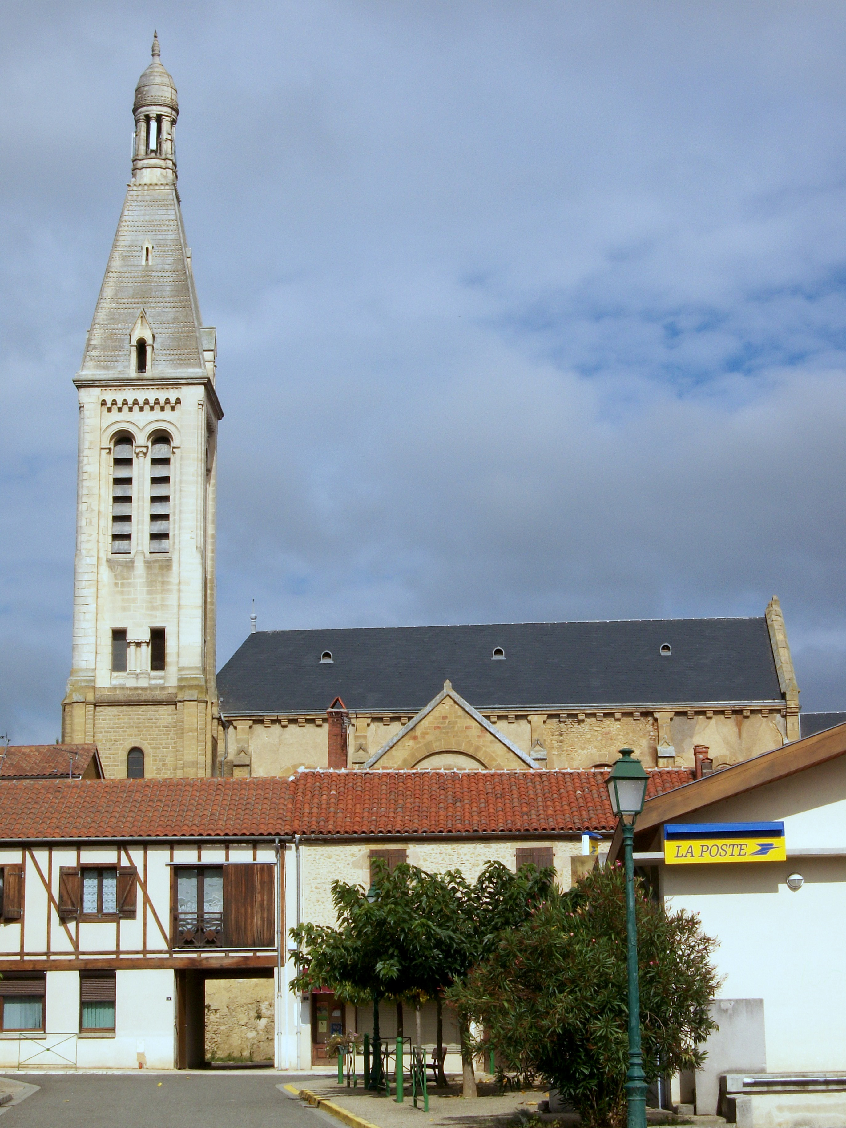 Église Saint-Barthélemy de Miélan (Gers, France)